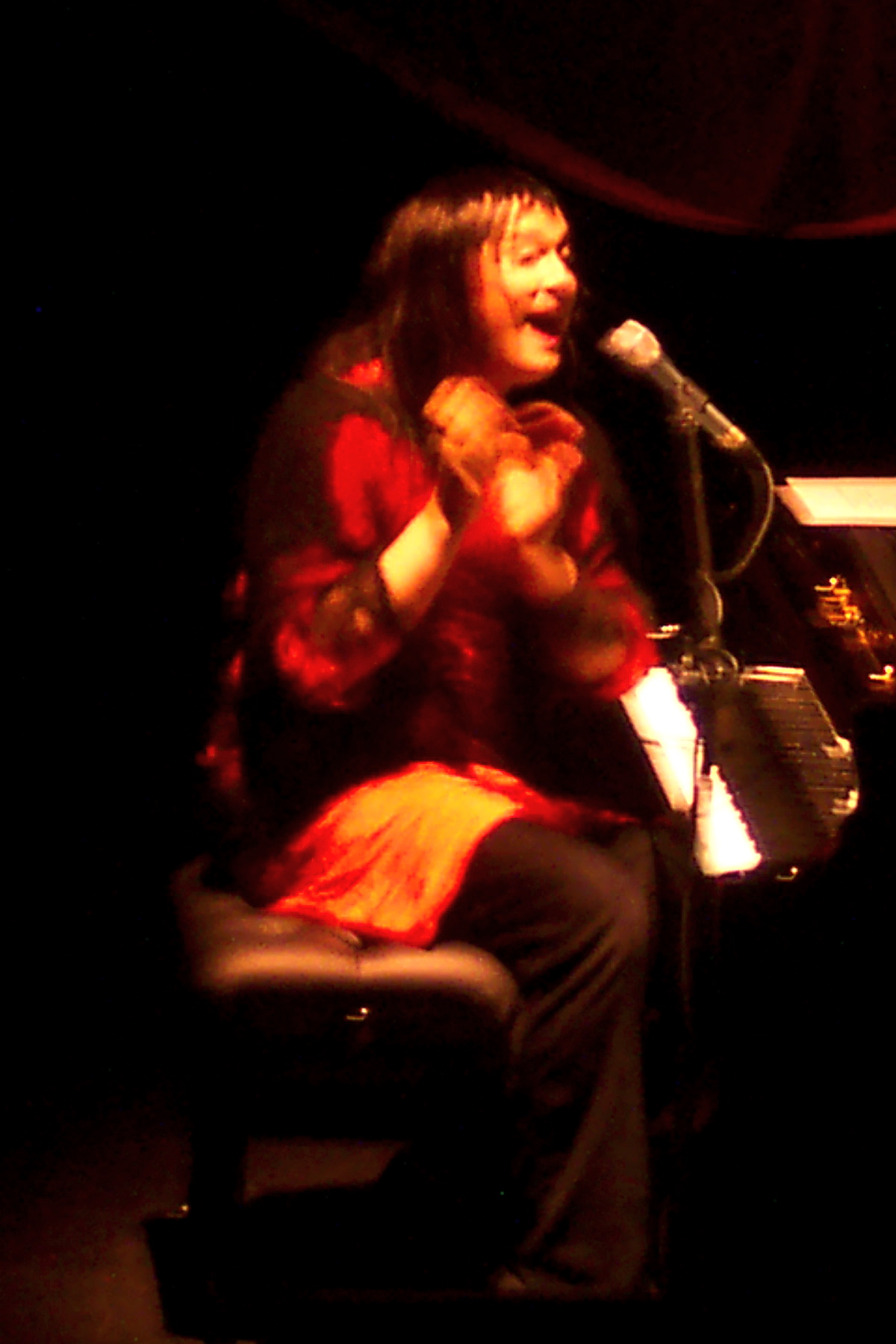 Antony Hegarty from Antony and the Johnsons. Doing a clap song. Hace unos días Elena lo describió acertadamente como "algo así como un Robert Smith autista".